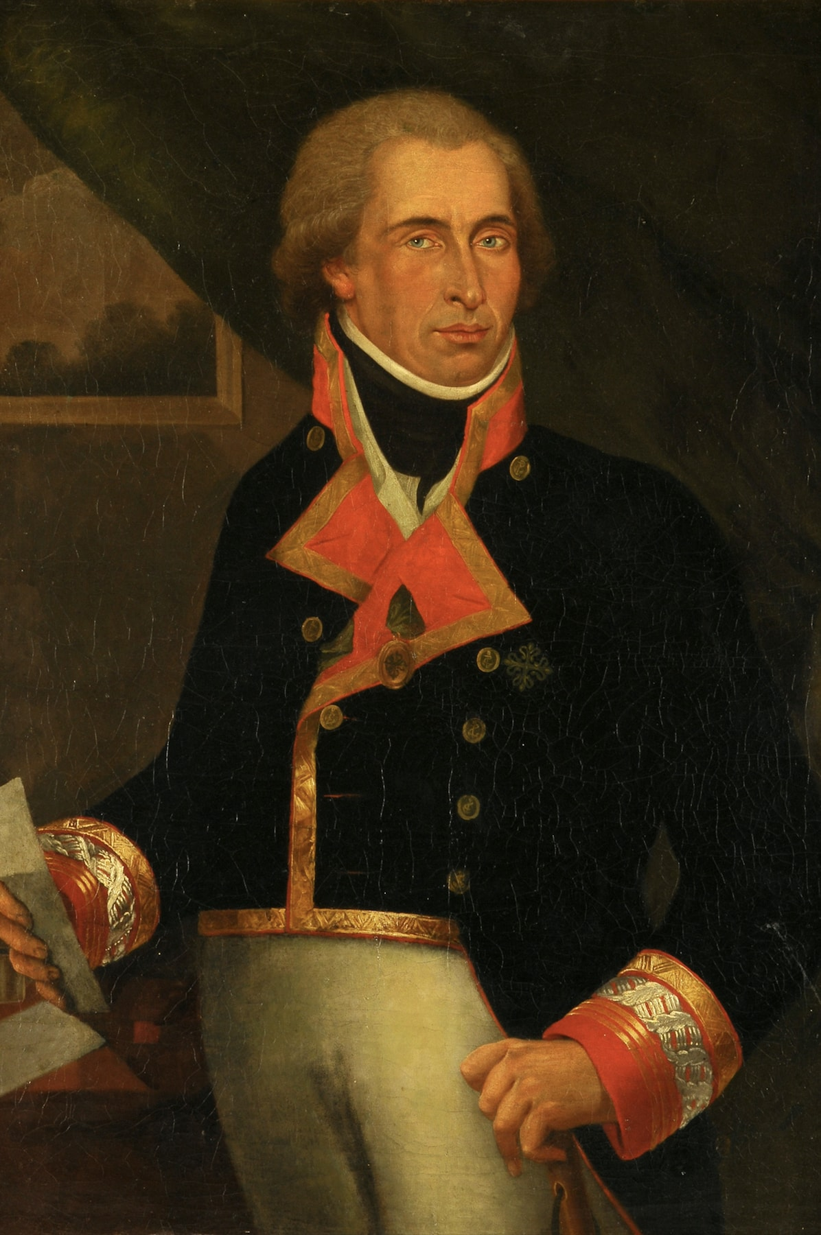 Retrato del marino español Dionisio Alcalá Galiano (1760-1805), que llegó a ser brigadier de la Real Armada Española y murió en la batalla de Trafalgar, el día 21 de octubre de 1805. El retratado aparece de medio cuerpo y de frente y con la cruz de caballero de la Orden de Alcántara bordada en el pecho. Y viste uniforme pequeño de brigadier de la Real Armada y de comandante general de Pilotos. Este retrato es una obra anónima de la escuela napolitana.